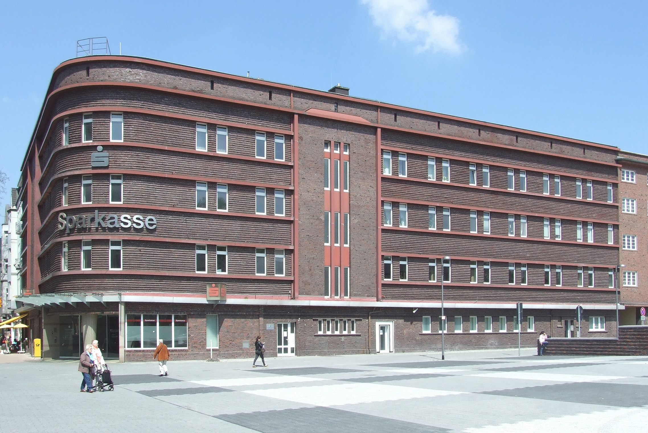 Herne, Stadtteil Wanne, Sparkasse